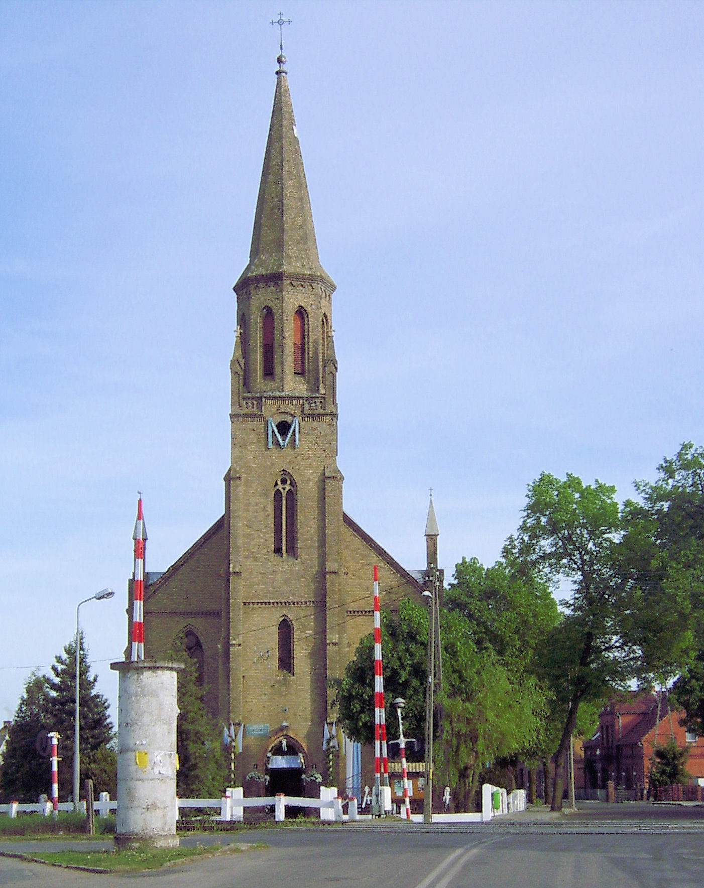 Stare Kurowo - kościół parafialny p.w. śś. Piotra i Pawła z 1877 r. (zabytek nr L-253/A)